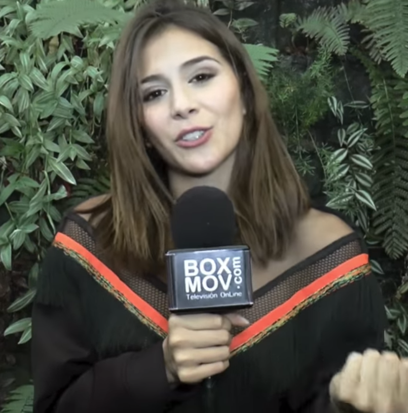 Greeicy Rendón en el lanzamiento de la novela Tiro de Gracia en 2015